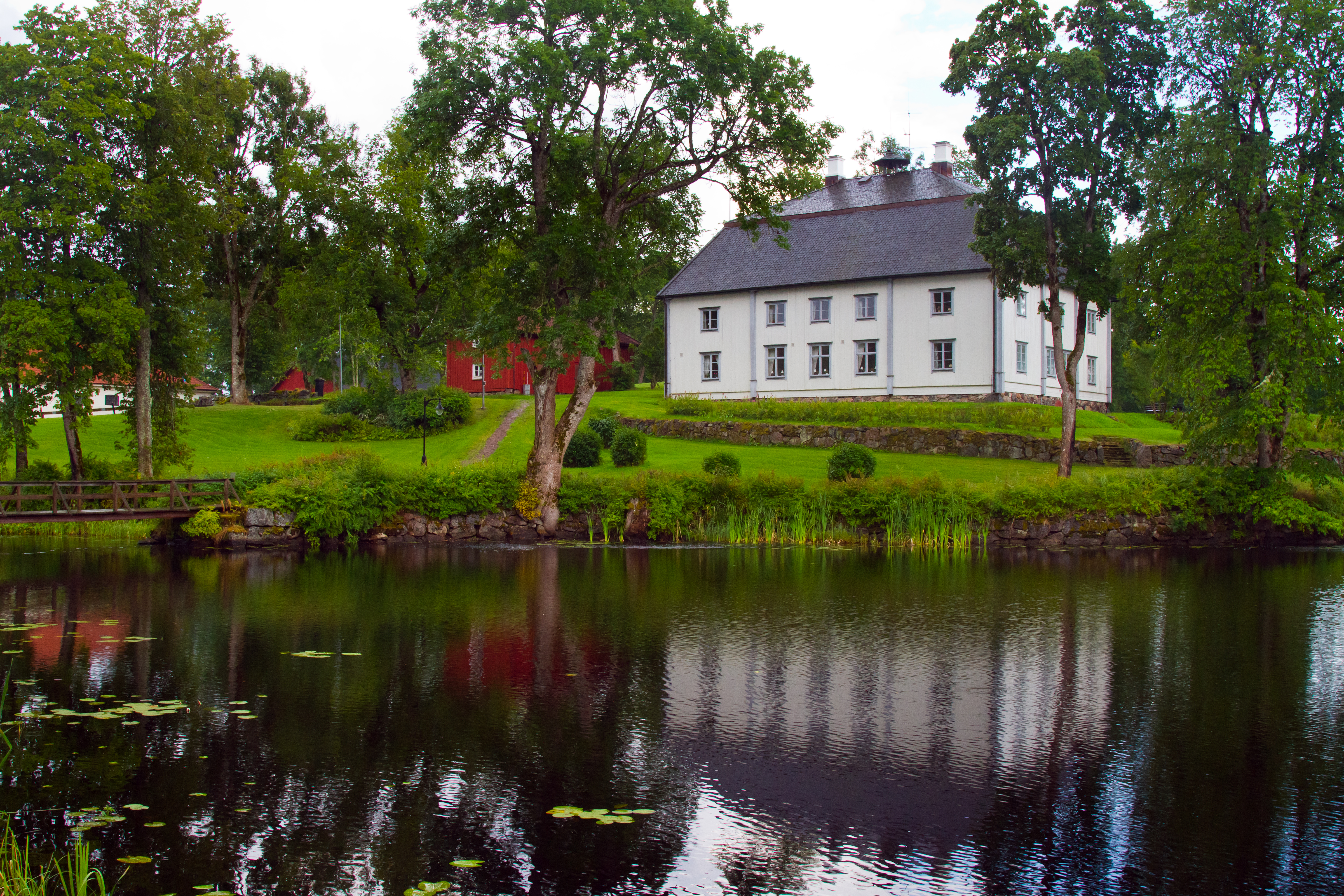 Villingsberg är en bruksherrgård med 6 byggnader som ligger i Karlskoga kommun, Sverige